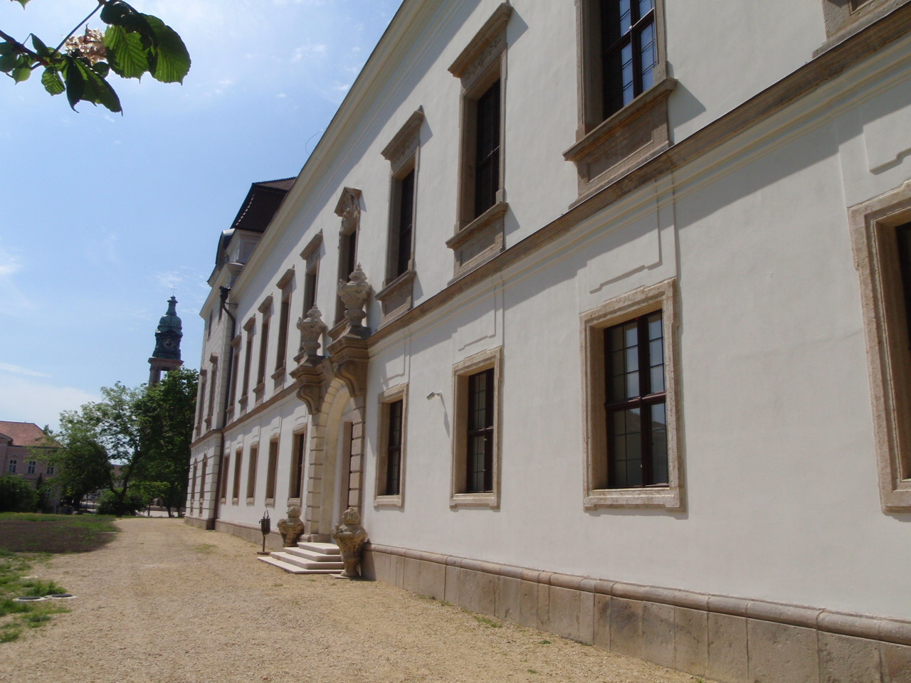 Esterházy-kastély Pápa, háttérben a Fő tér temploma